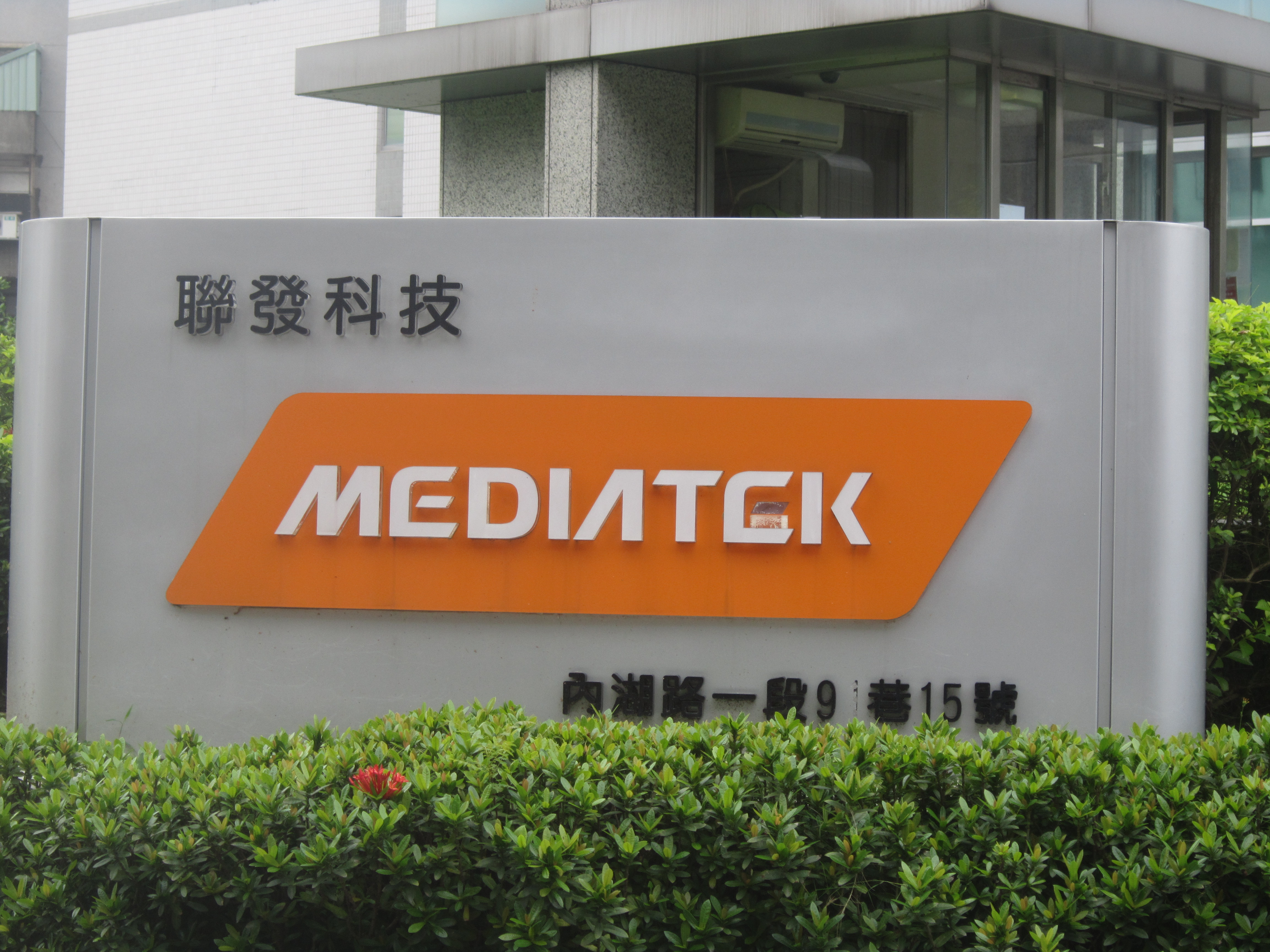 臺北市內湖區內湖路一段91巷「太陽科技廣場」C棟前的聯發科技台北分公司立牌。